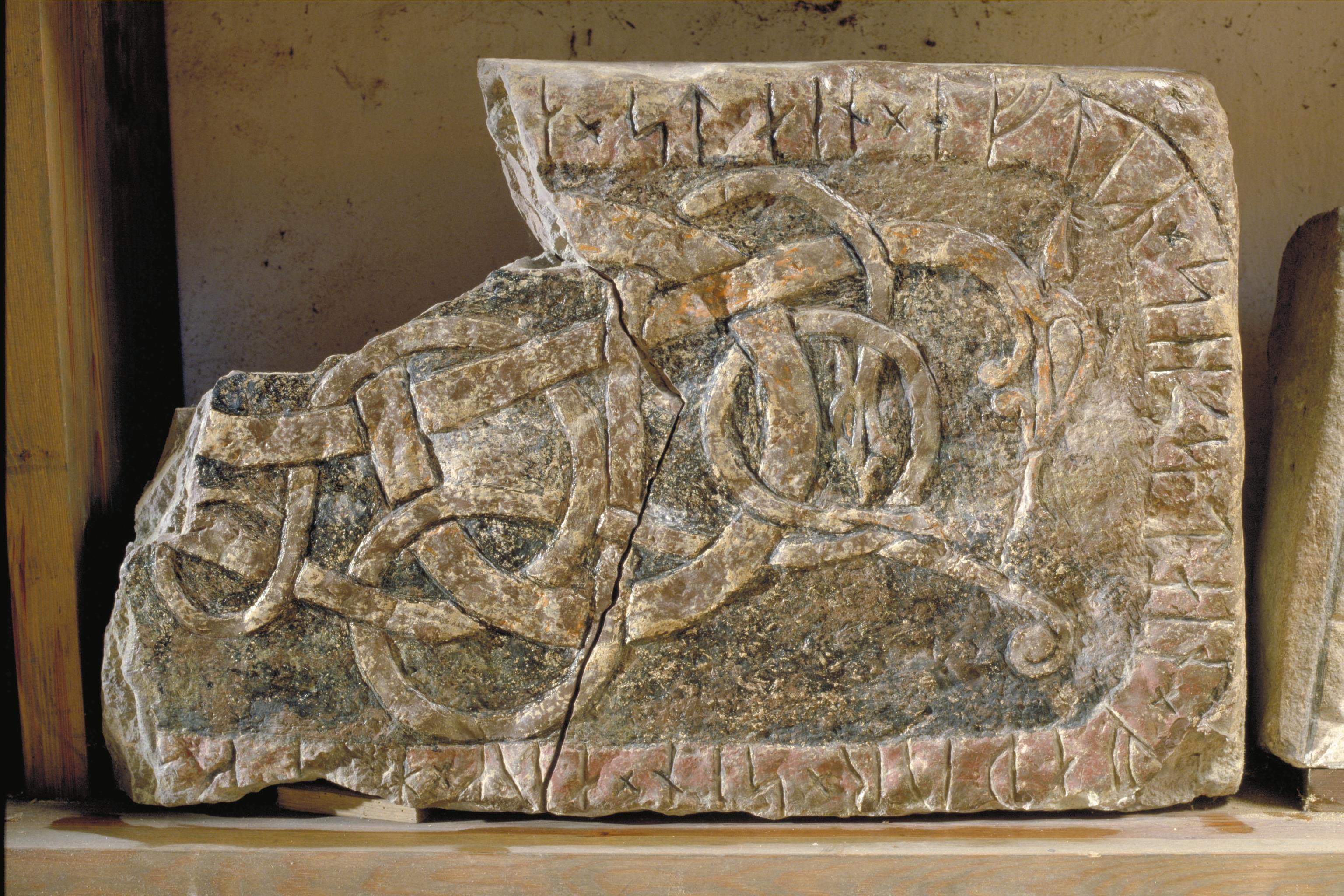 Runstensfragment (Öl25339:29 Köpingsvik). Inskriften lyder: .. sten efter Sigsten, sin fader och Helga (eller Helge) .. Motiv: Öl Köpingsvik kyrka (flera objekt) Nyckelord: Runor Kategori: Runristning/runsten Runstensfragment (Öl25339:29 Köpingsvik). Inskriften lyder: .. sten efter Sigsten, sin fader och Helga (eller Helge).